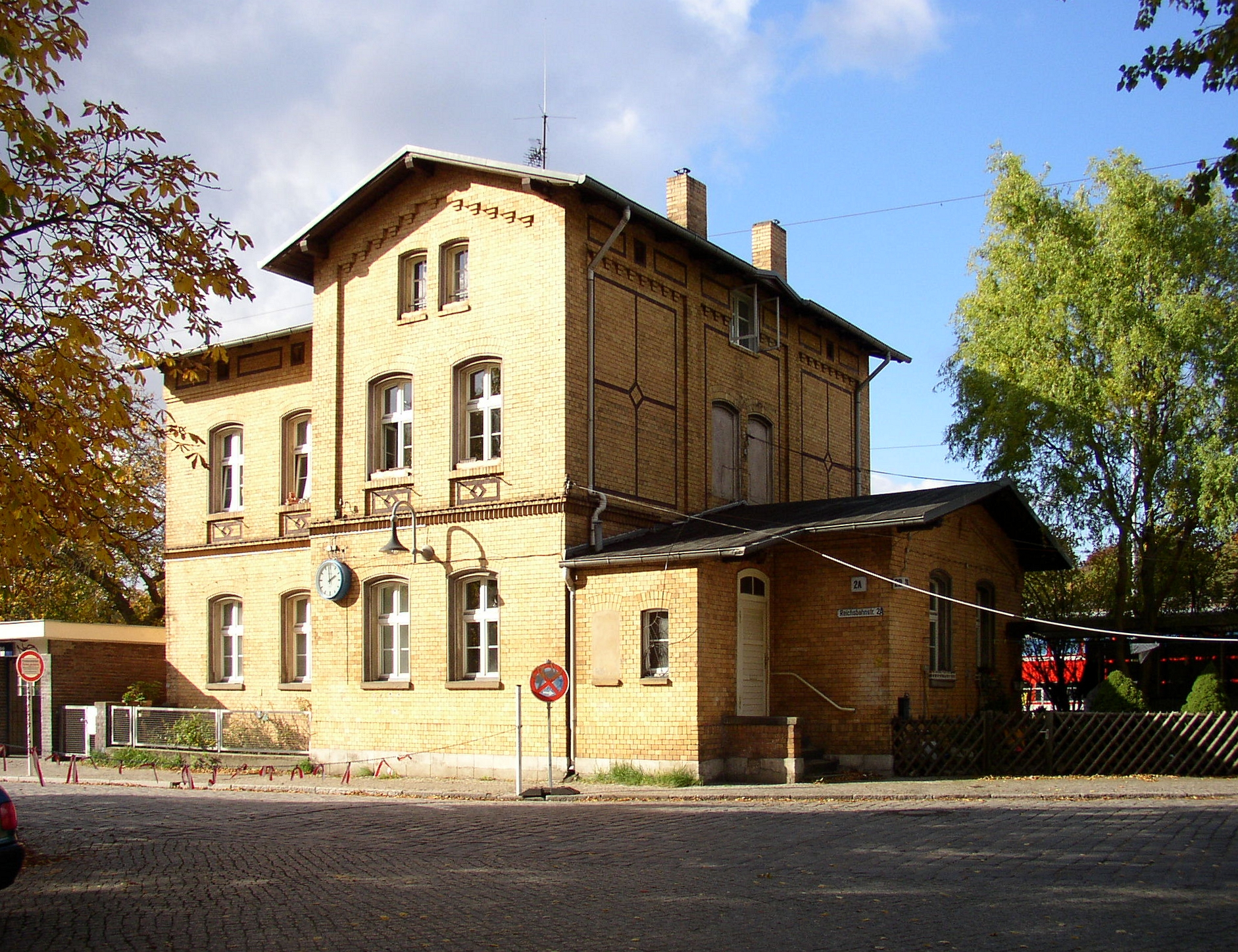 Bahnhof Berlin-Wannsee, rueckwaertiger Eingang